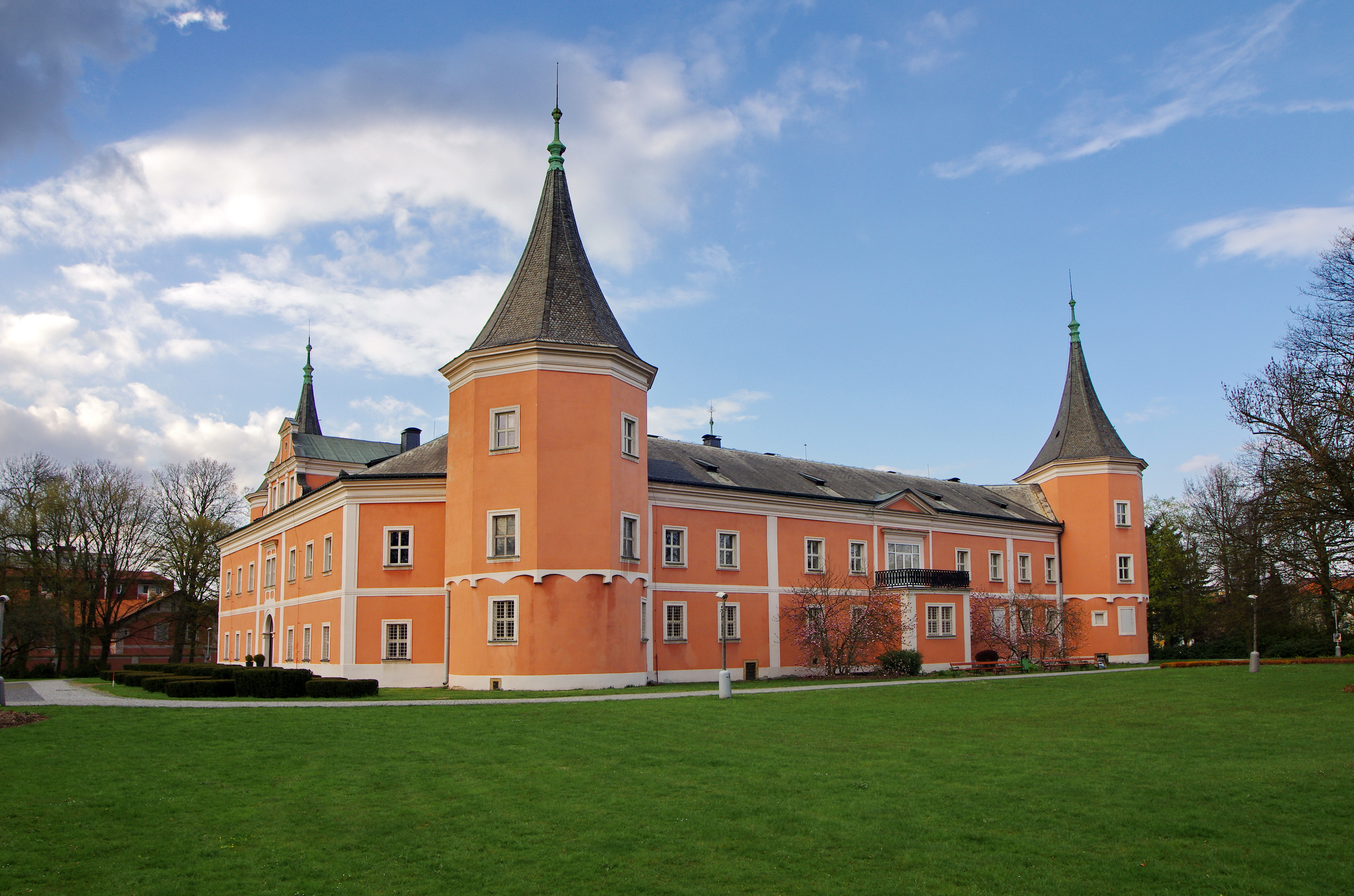 Zámek Sokolov, Zámecká 2/1, Sokolov.